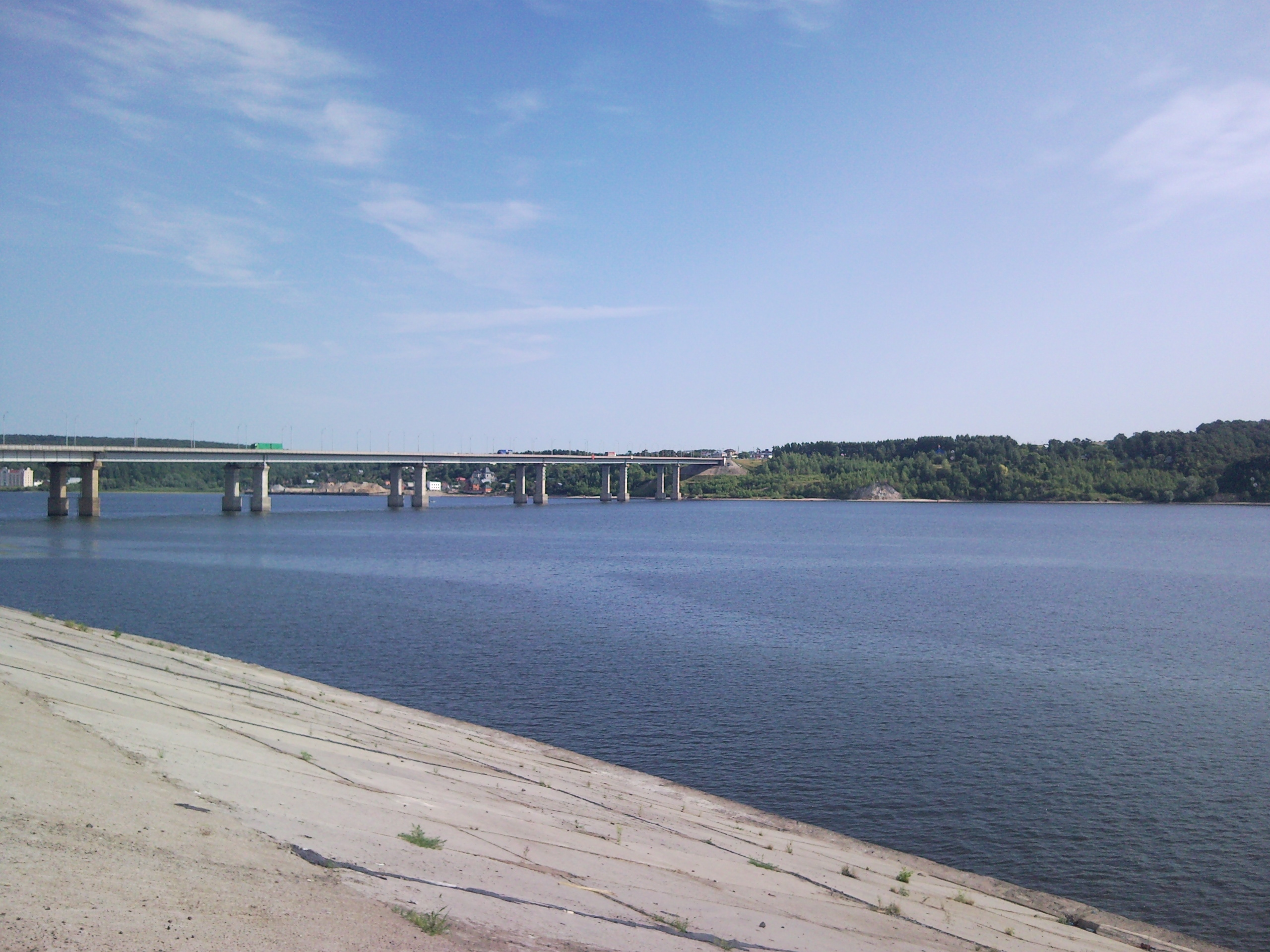 Мост на М7 через Волгу